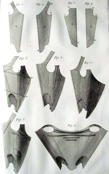 Patrons et modèles de corsets du milieu du XVIIIe siècle. L'art du Tailleur d'habits et de corps. Planche 22 du supplément de planches gravées à l'Encyclopédie de Diderot et d'Alembert (1767).